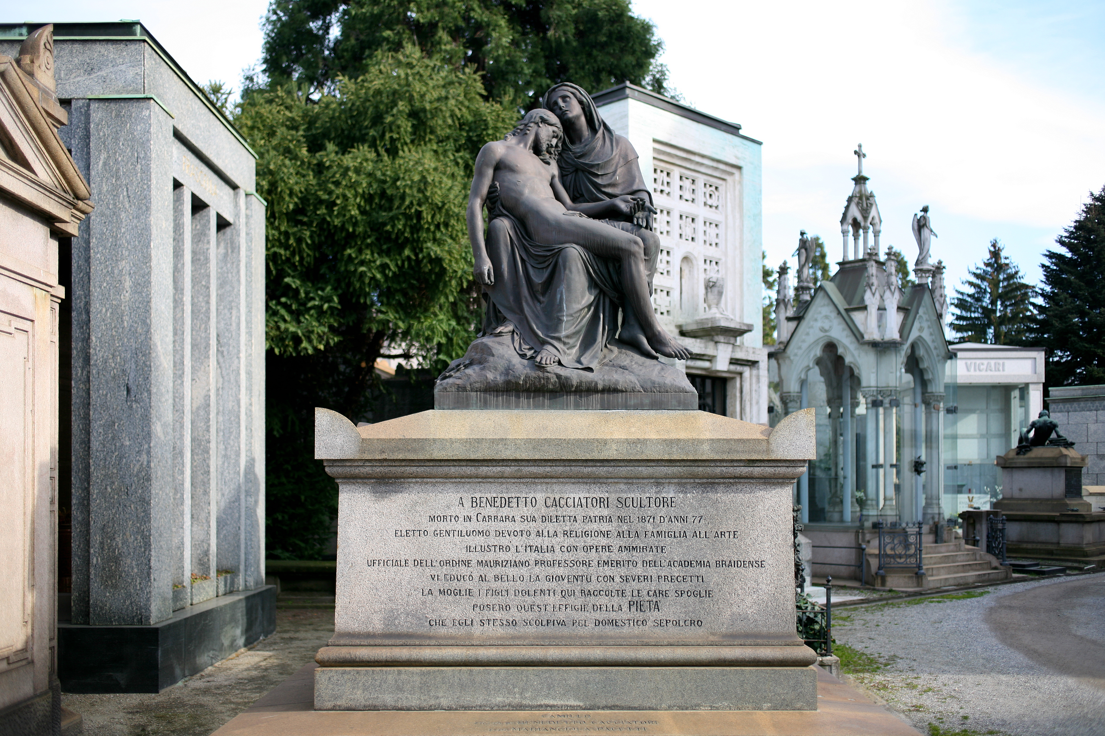 Benedetto Cacciatori Tomba al Cimitero Monumentale, opera propria dello scultore